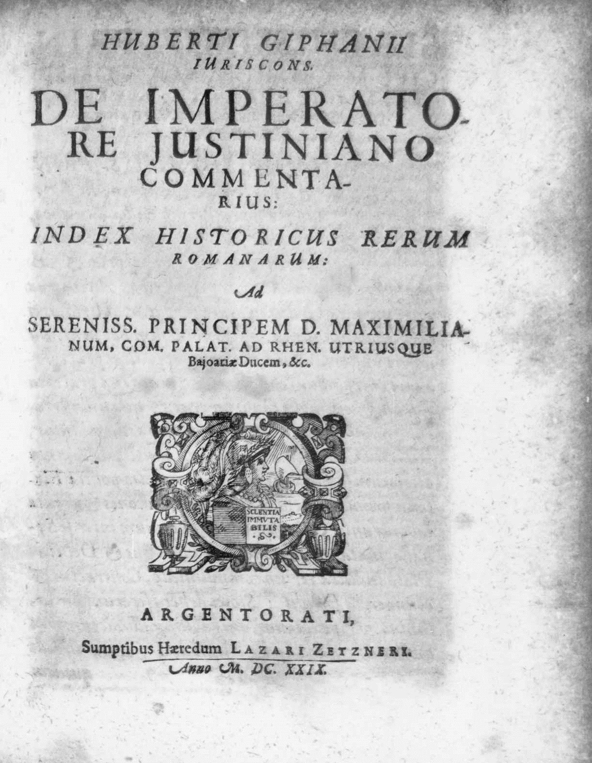 Frontespizio